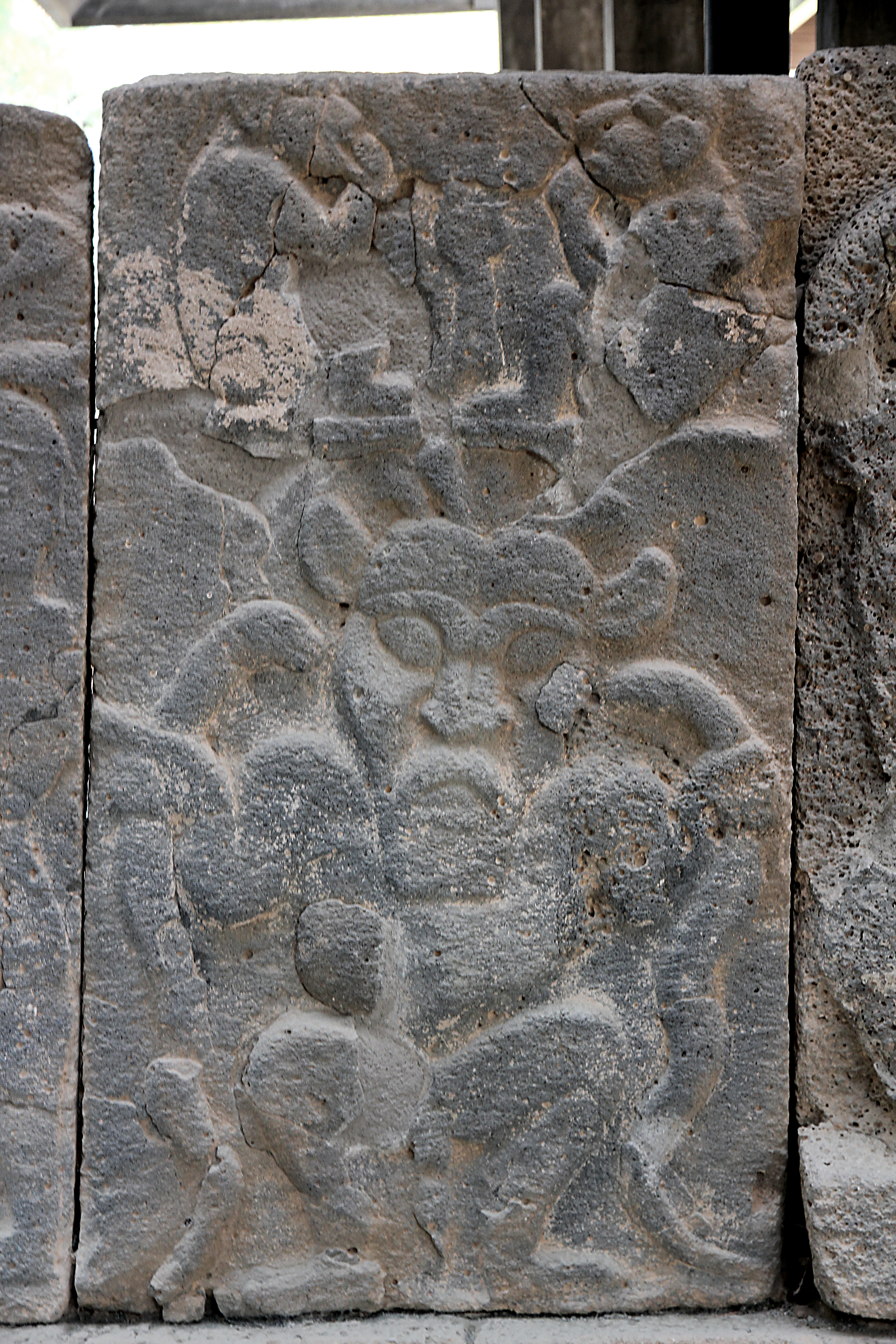 Karatepe (Asatiwataya), neo-hethitischer Fundort bei Osmaniye, Südtürkei, Nordtor, rechte Kammer, Relief NKr 2